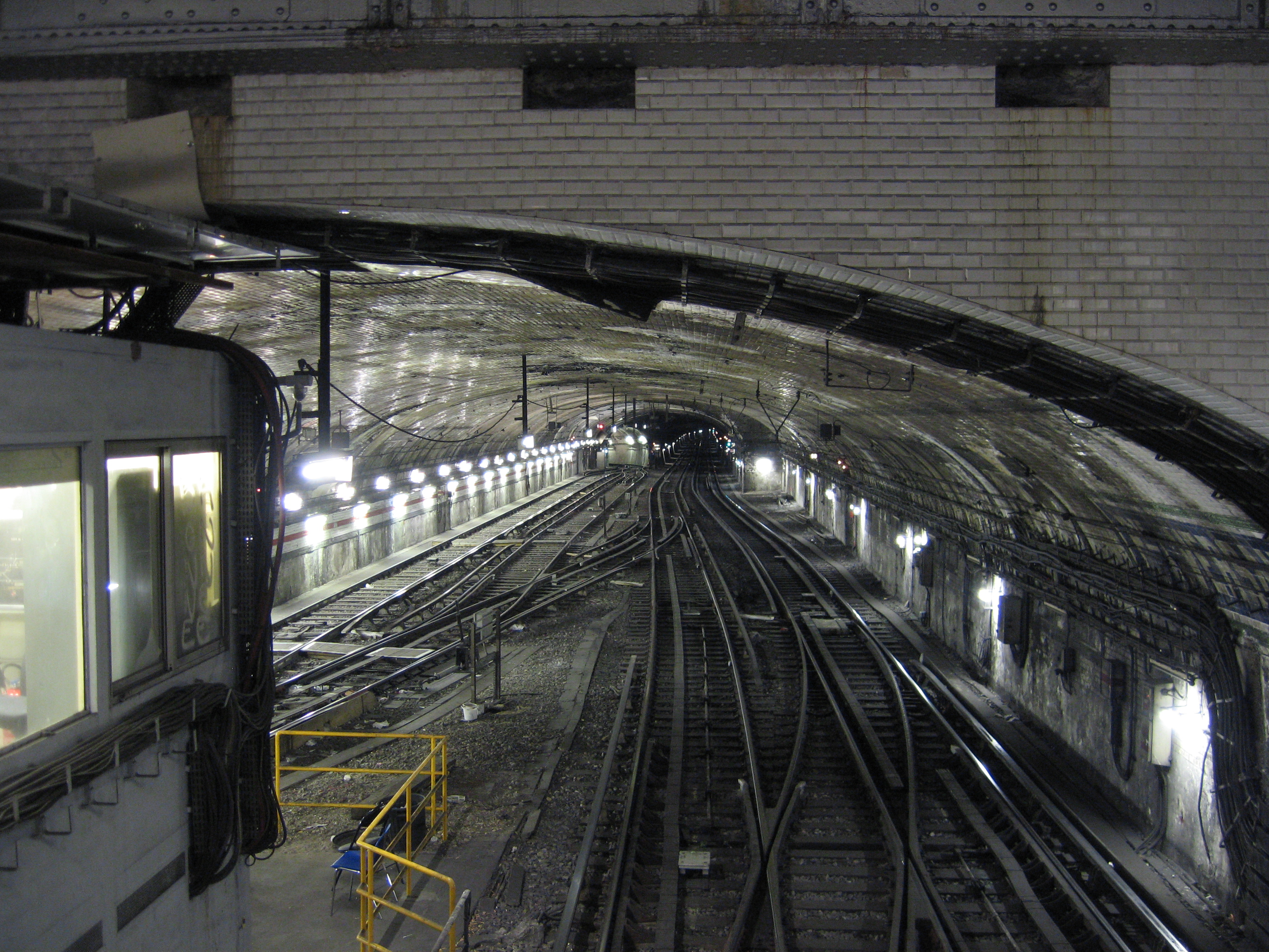 Vue du tunnel au nord de la station Porte de Versailles, ligne 12 du métro de Paris. On peut voir des traces de l'ancienne station, et au fond à gauche l'accès à l'atelier de Vaugirard.